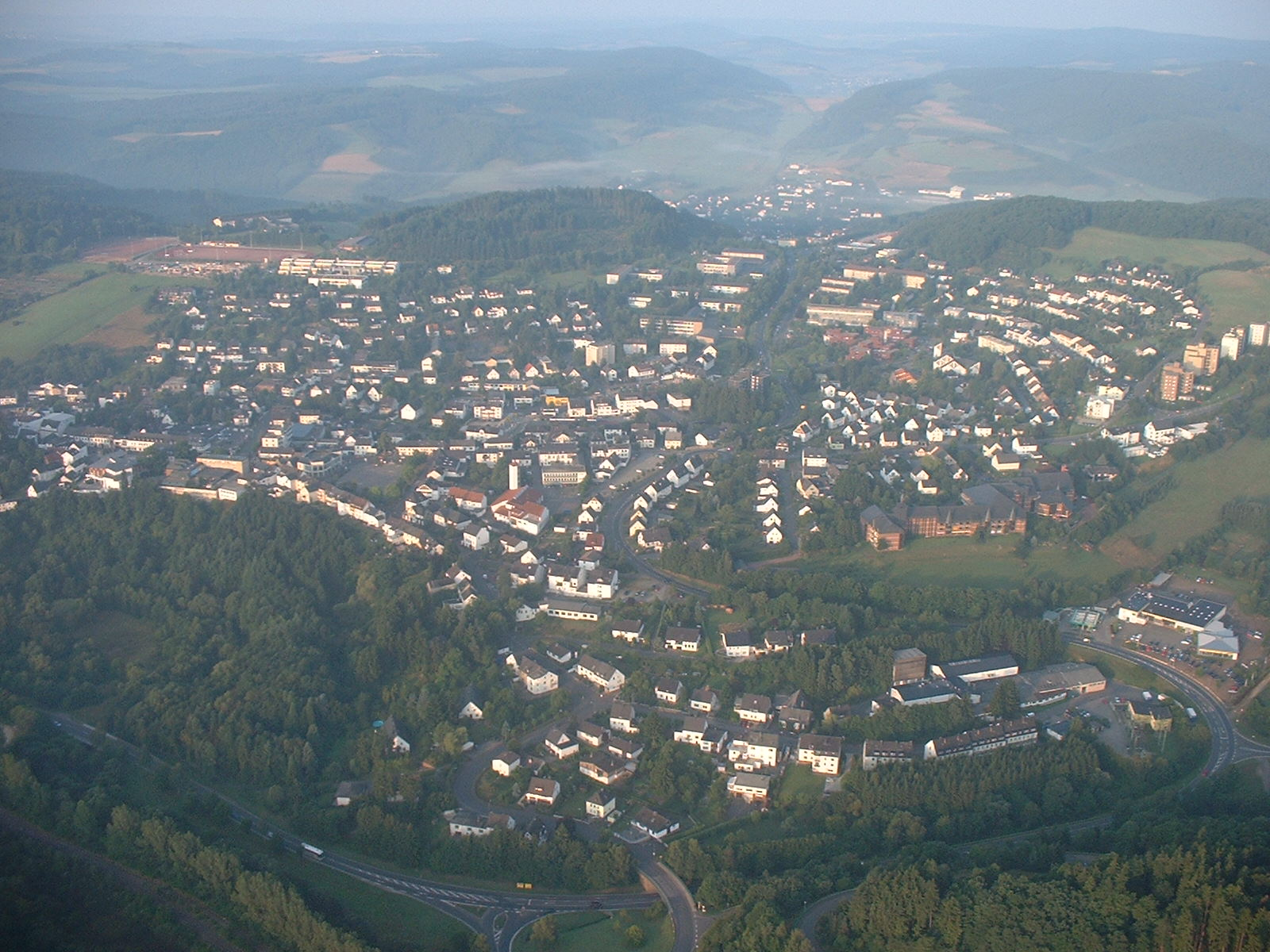 Luftbild von Daun aus einem Ballon